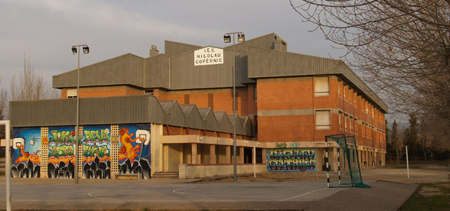 Fotografía del Instituto Nicolau Copèrnic (Terrassa)